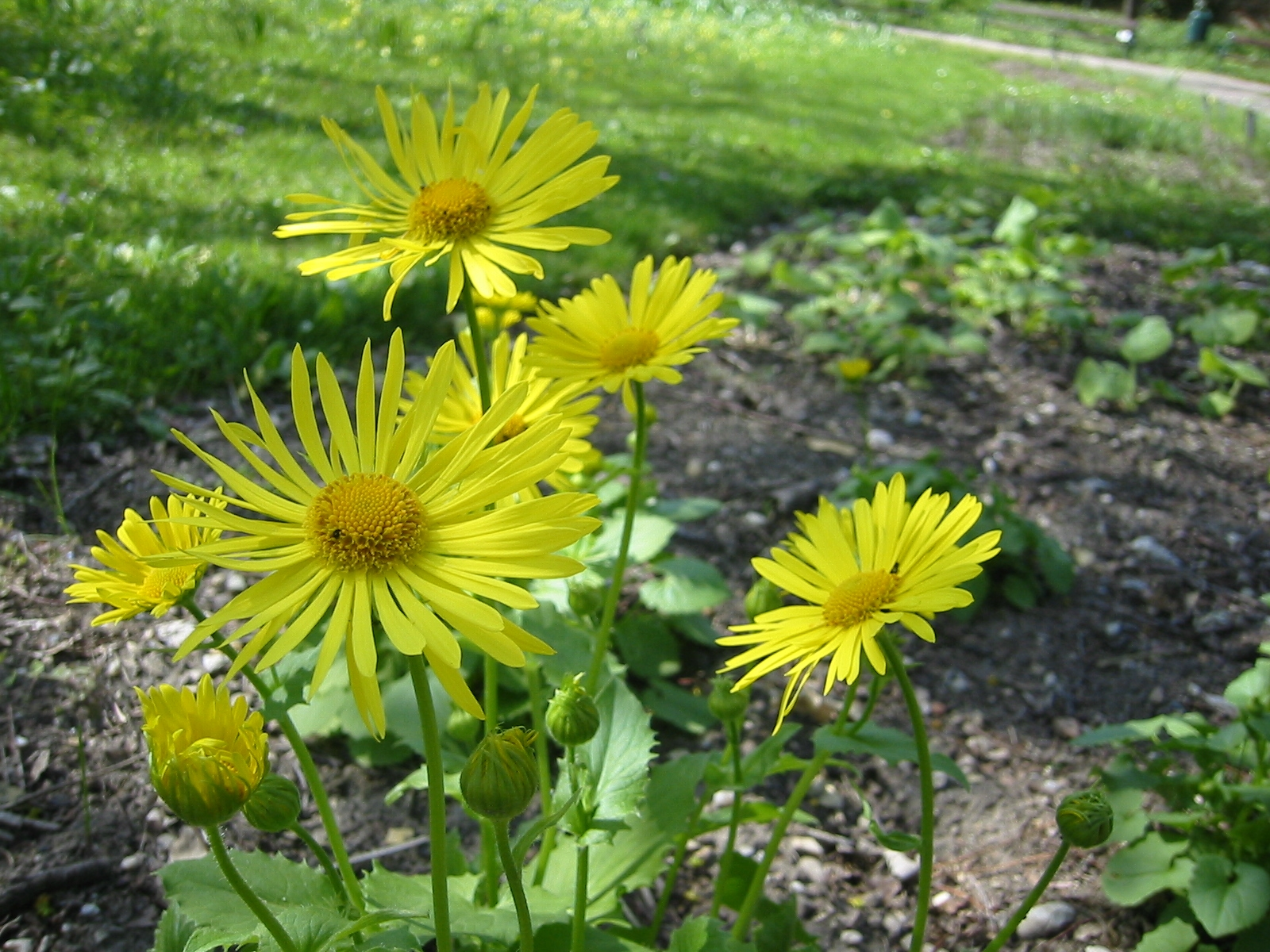 Doronicum columnae; Botanic Garden, Vienna, Austria.